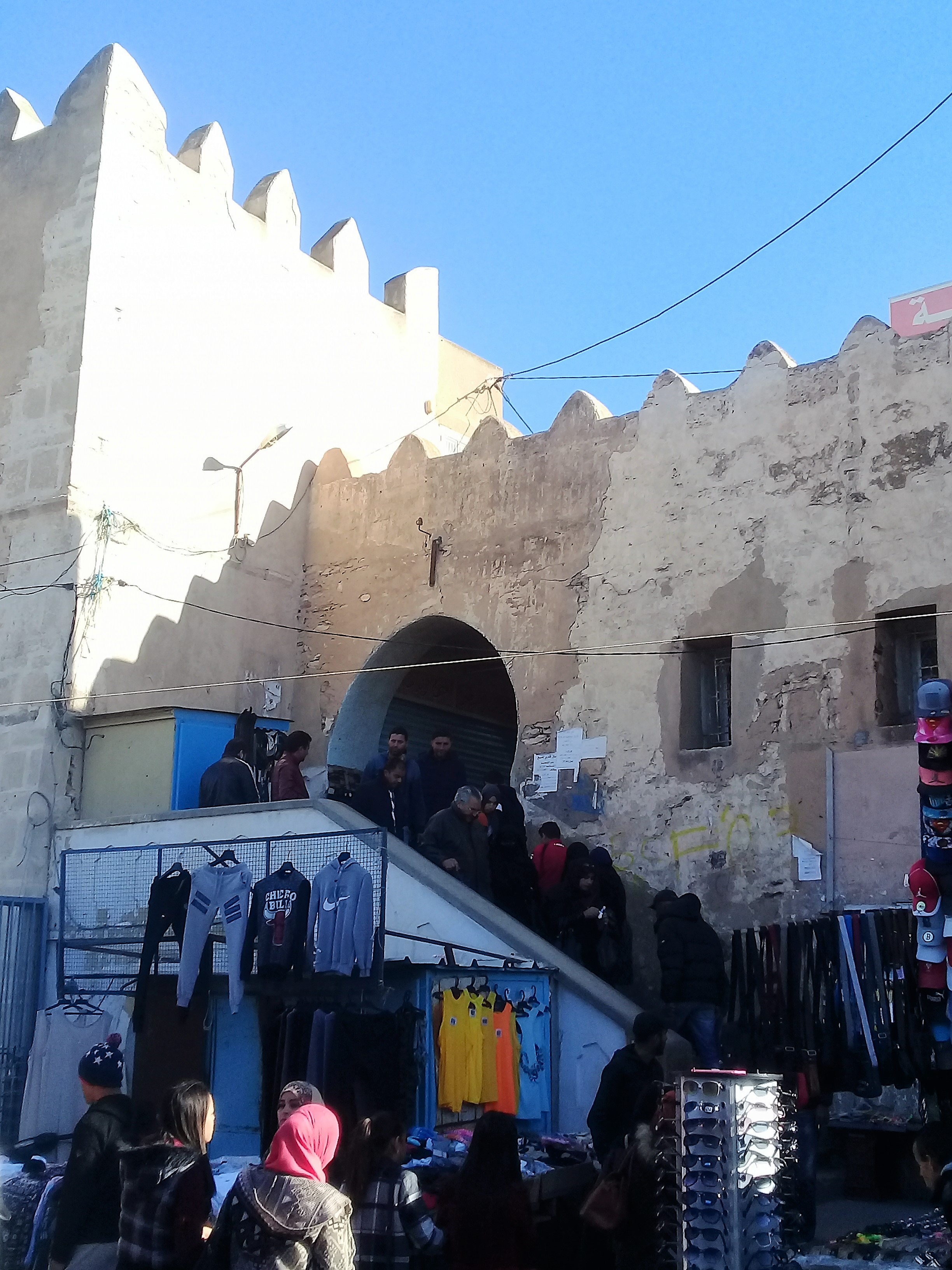 Bab Nahj El Bey - Ouverture & Escalier dit "Drouj Dimessi"